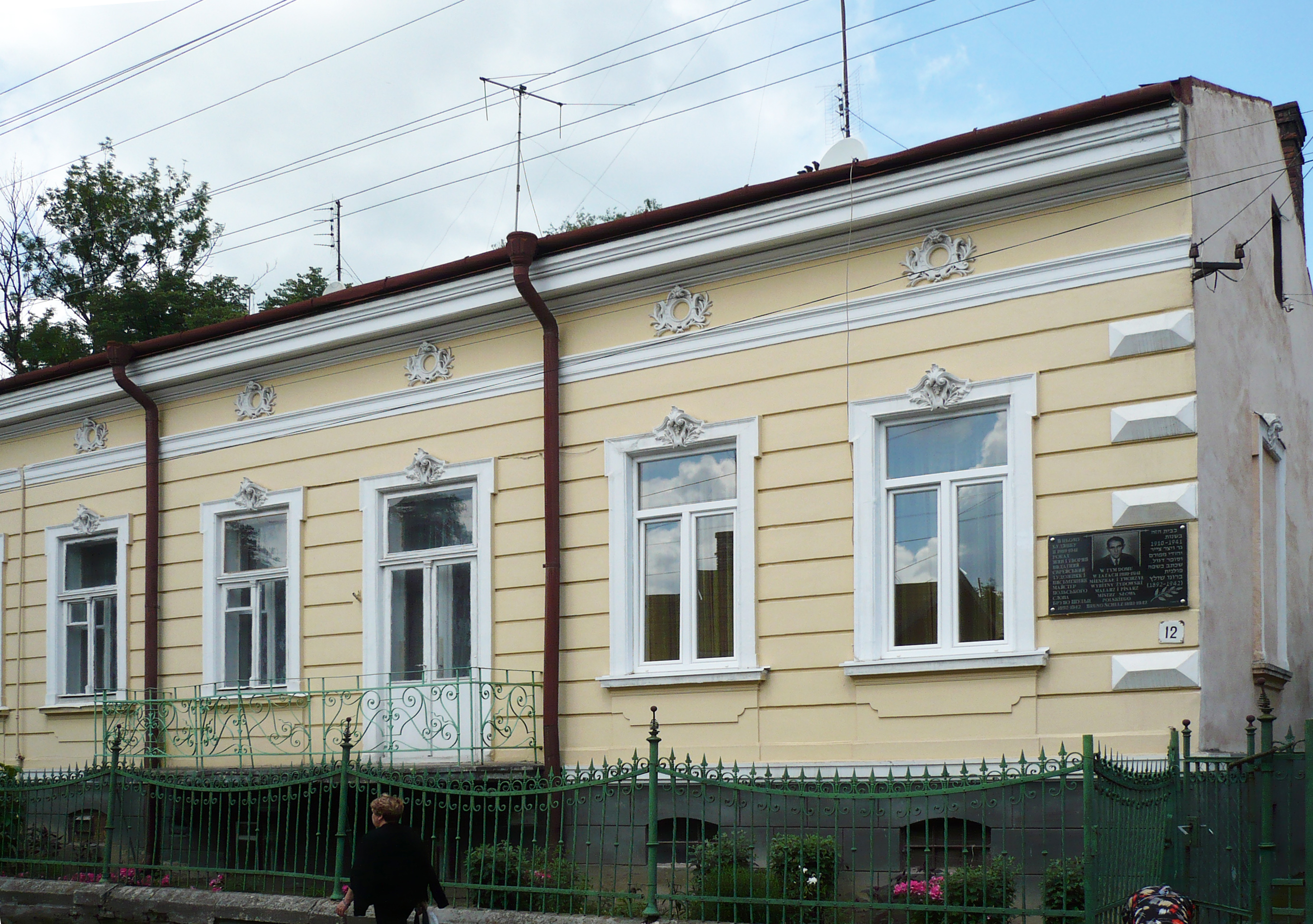 Dom B. Schulza